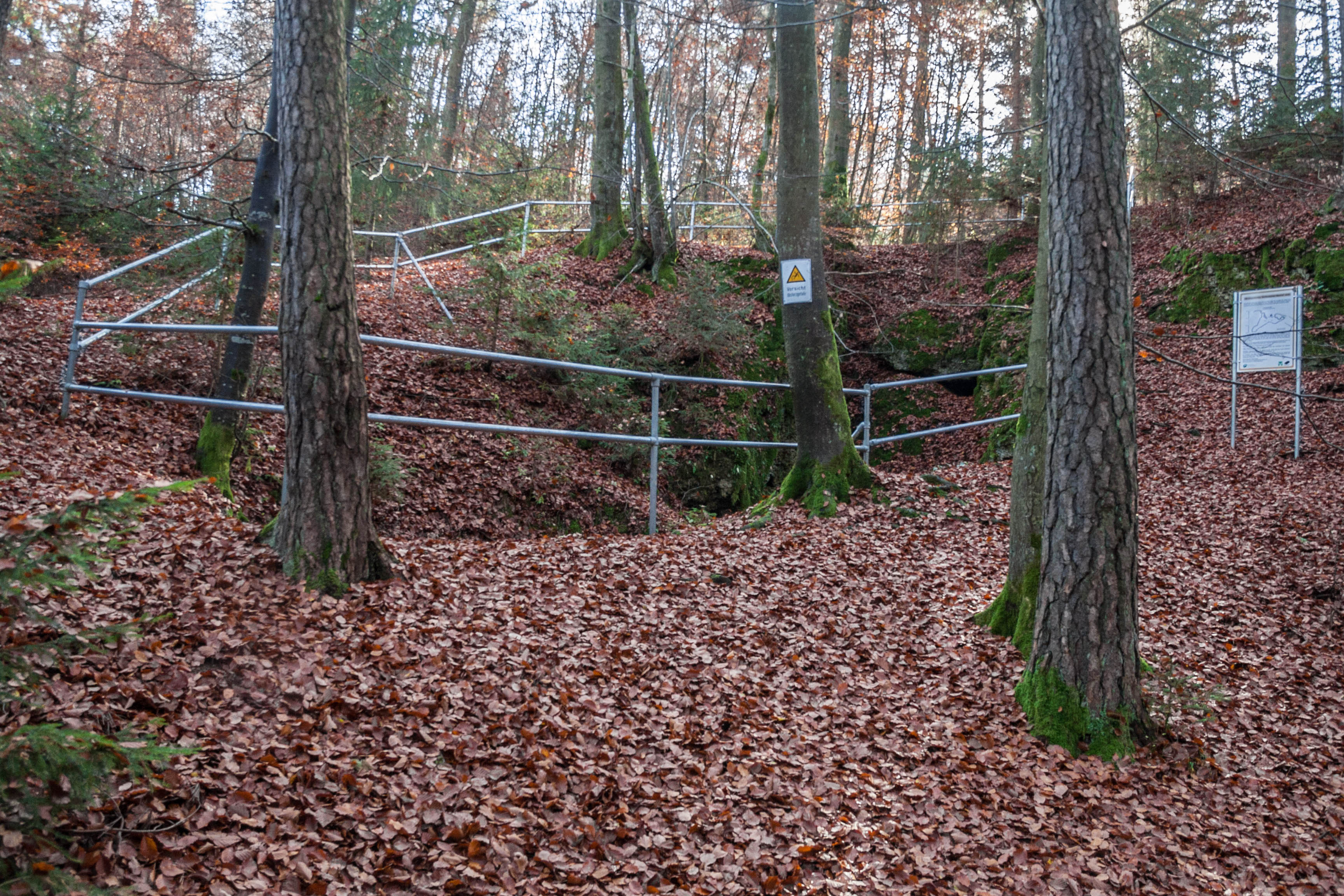 Breitensteiner Bäuerin, Höhle, A 32, Königstein